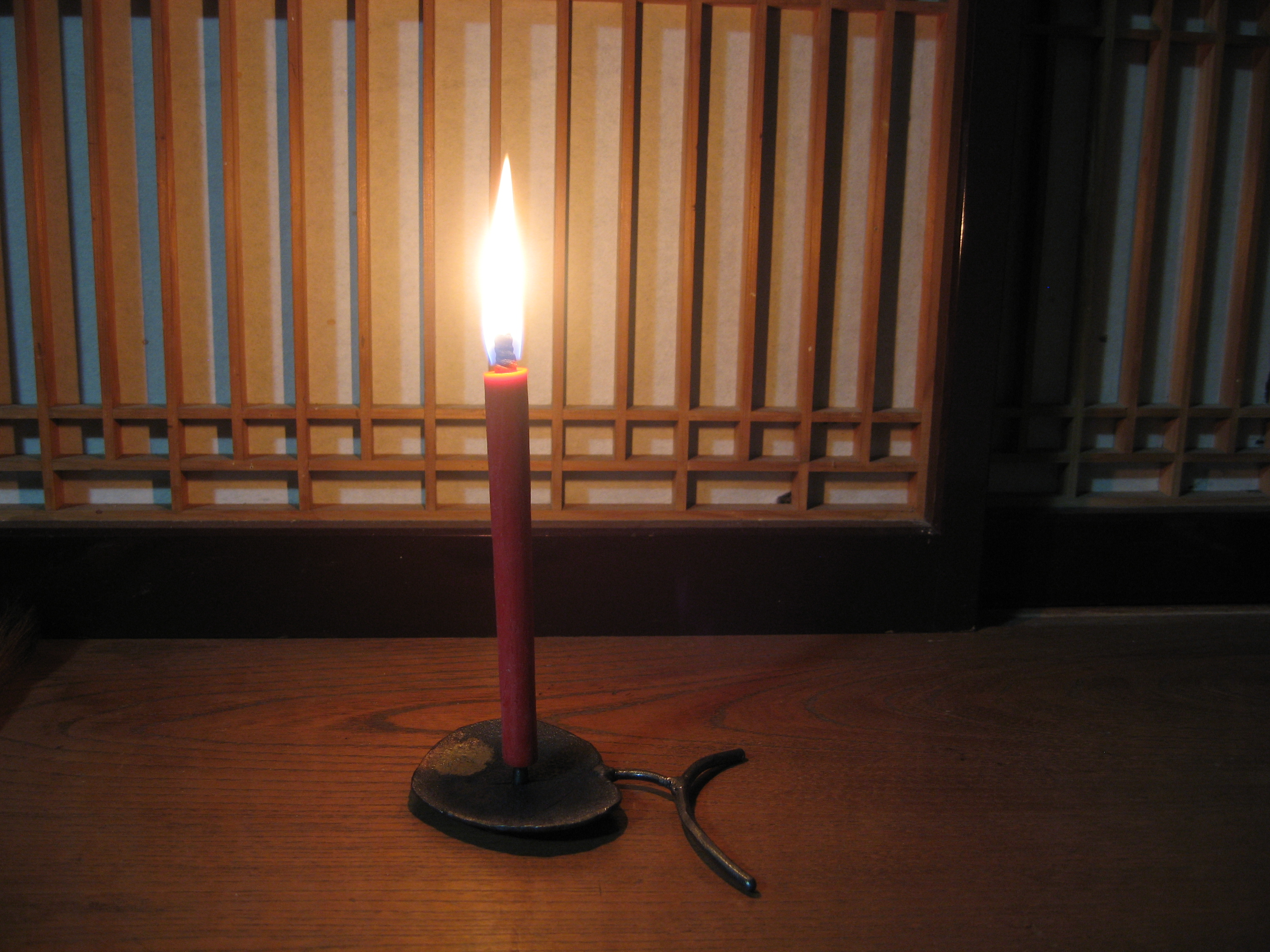 日本のハゼの蝋を用いた和蝋燭と燭台